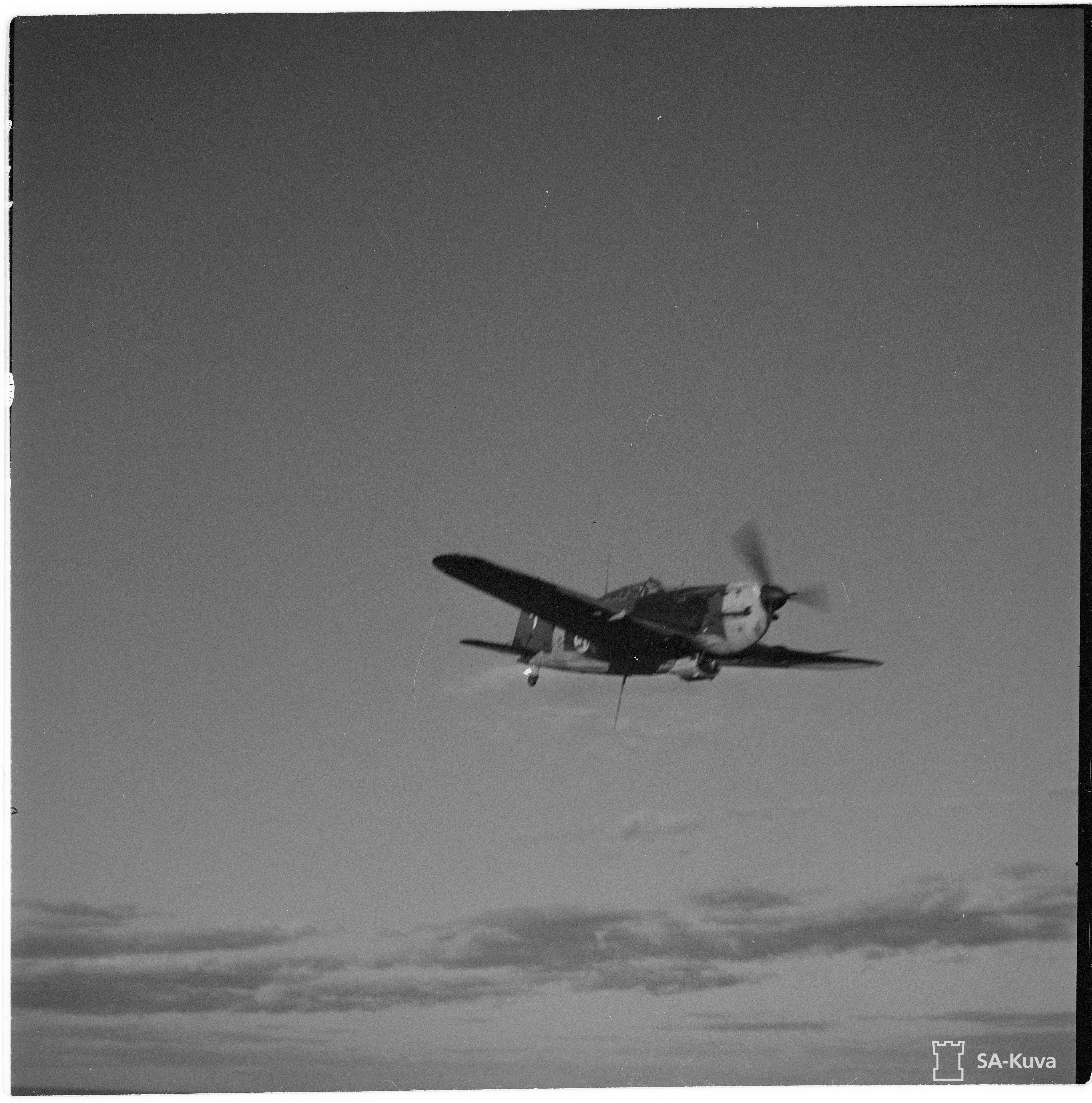 Suomalainen Morane-hävittäjä tiedustelulennolla äärettömän erämaaseudun yllä. (Kuvassa on Morane-Saulnier M.S.406 -hävittäjä). Kuvauspaikka: Tiiksjärvi